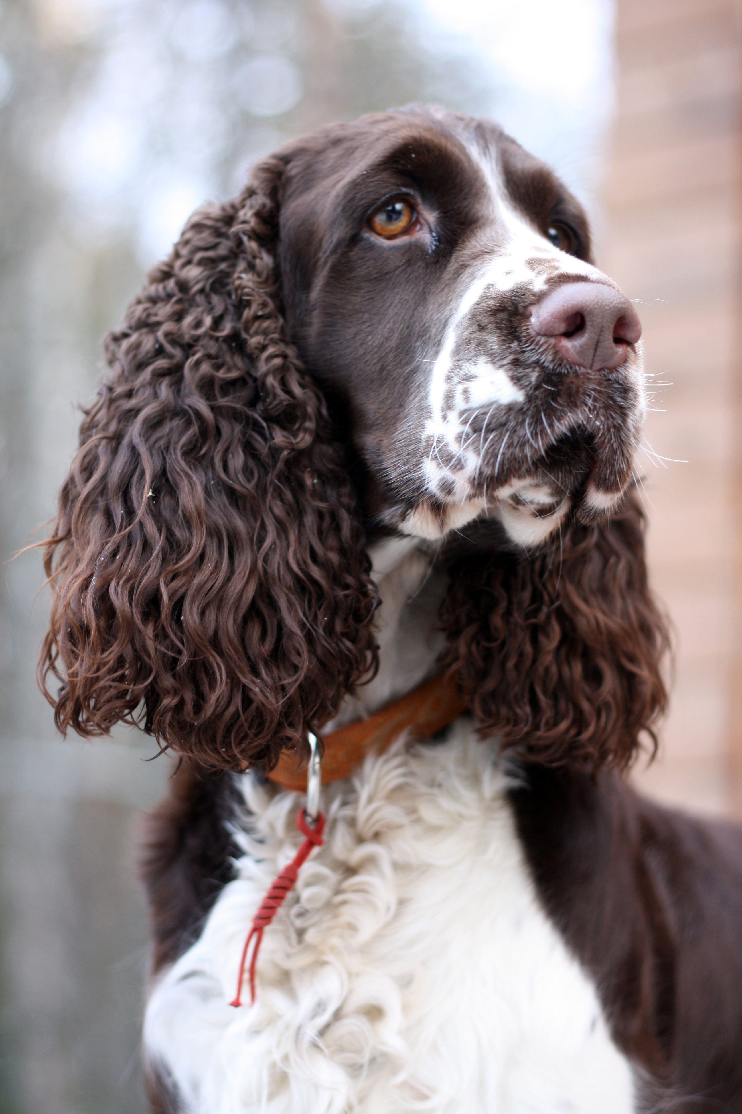 Английский спрингер спаниель Вейка 2 года .